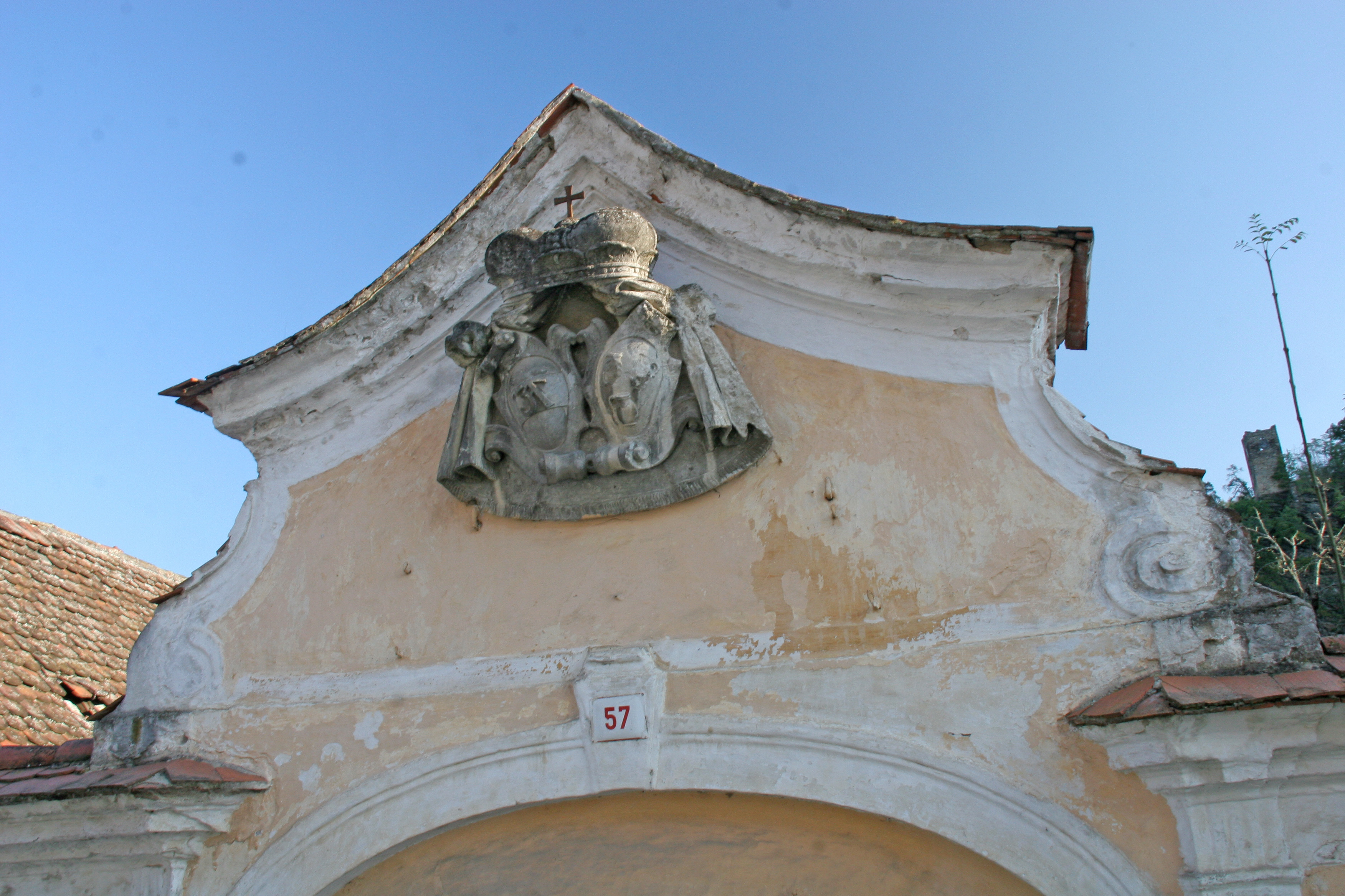 Vodní mlýn, Vranov nad Dyjí 67, Vranov nad Dyjí.